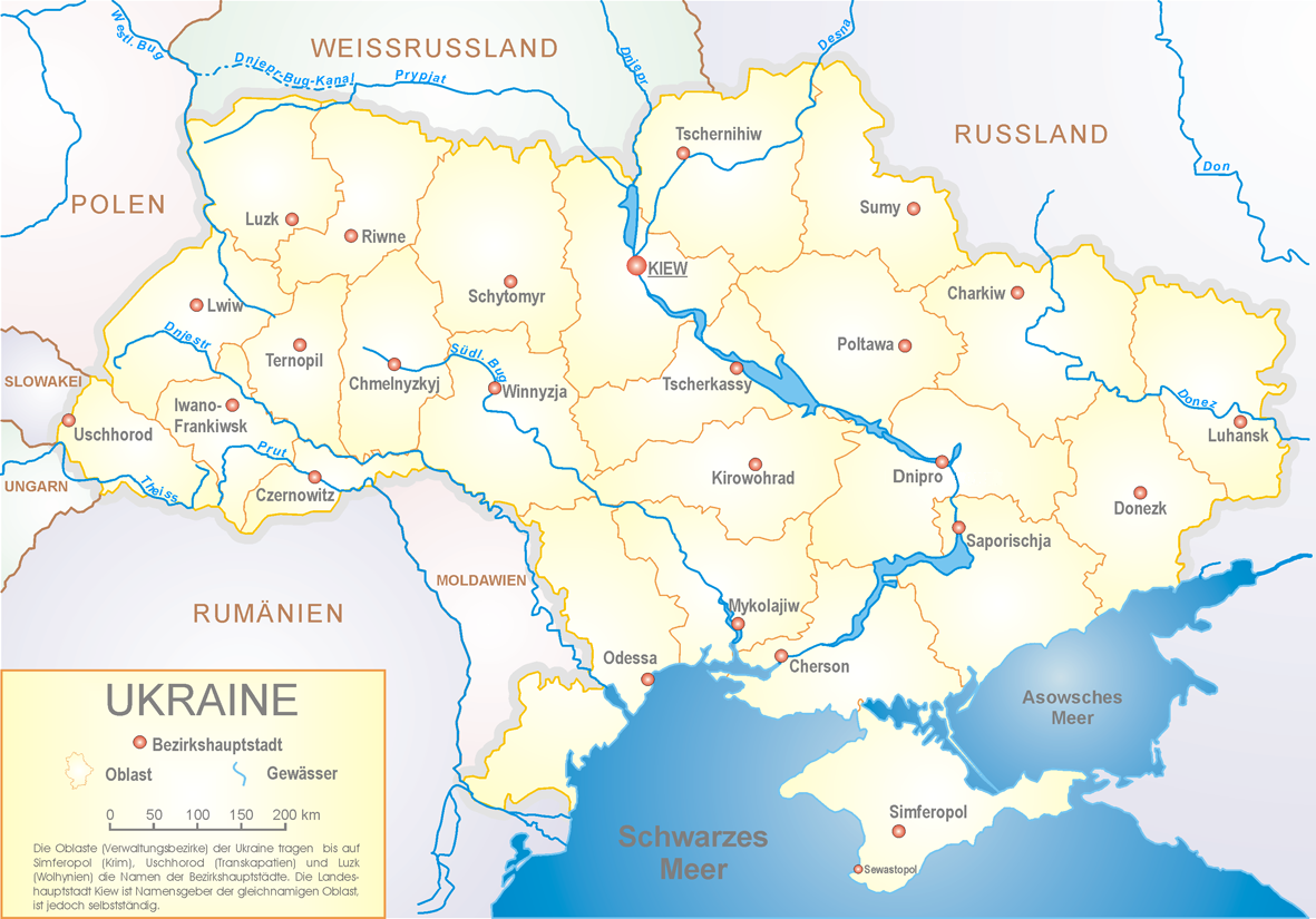 Ukraine, politische Gliederung